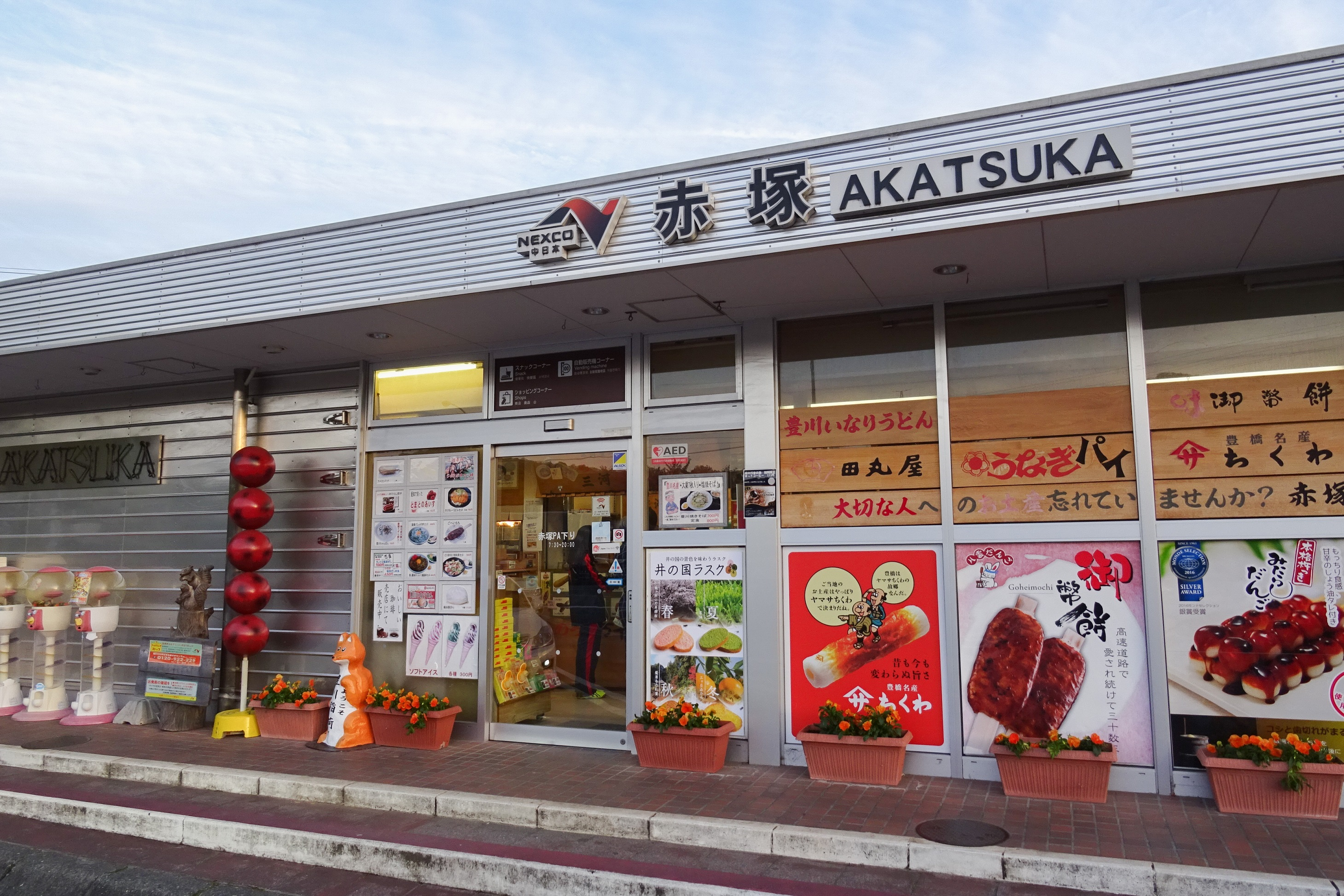 赤塚